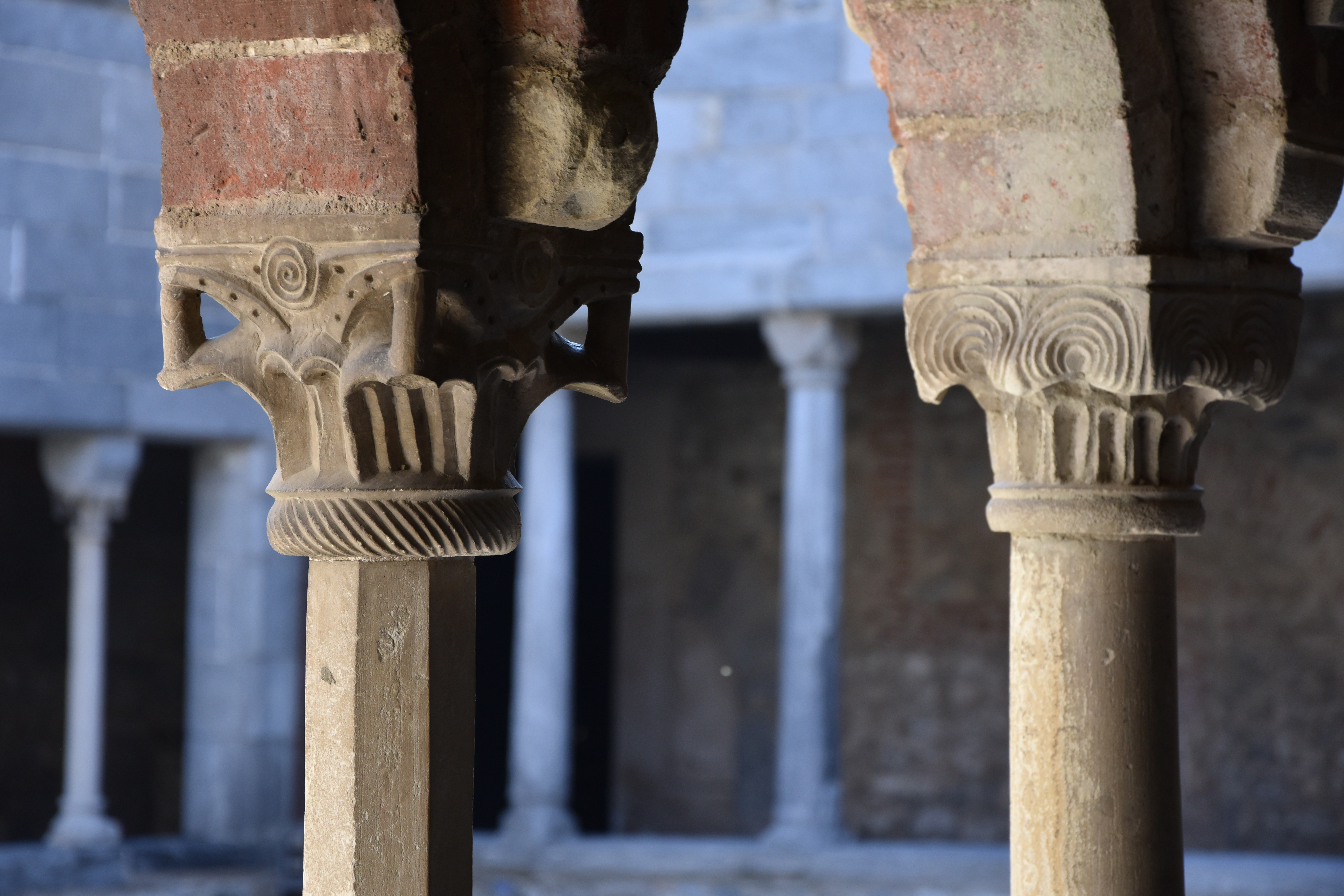 Interno del chiostro di Voltorre, Gavirate, provincia di Varese.